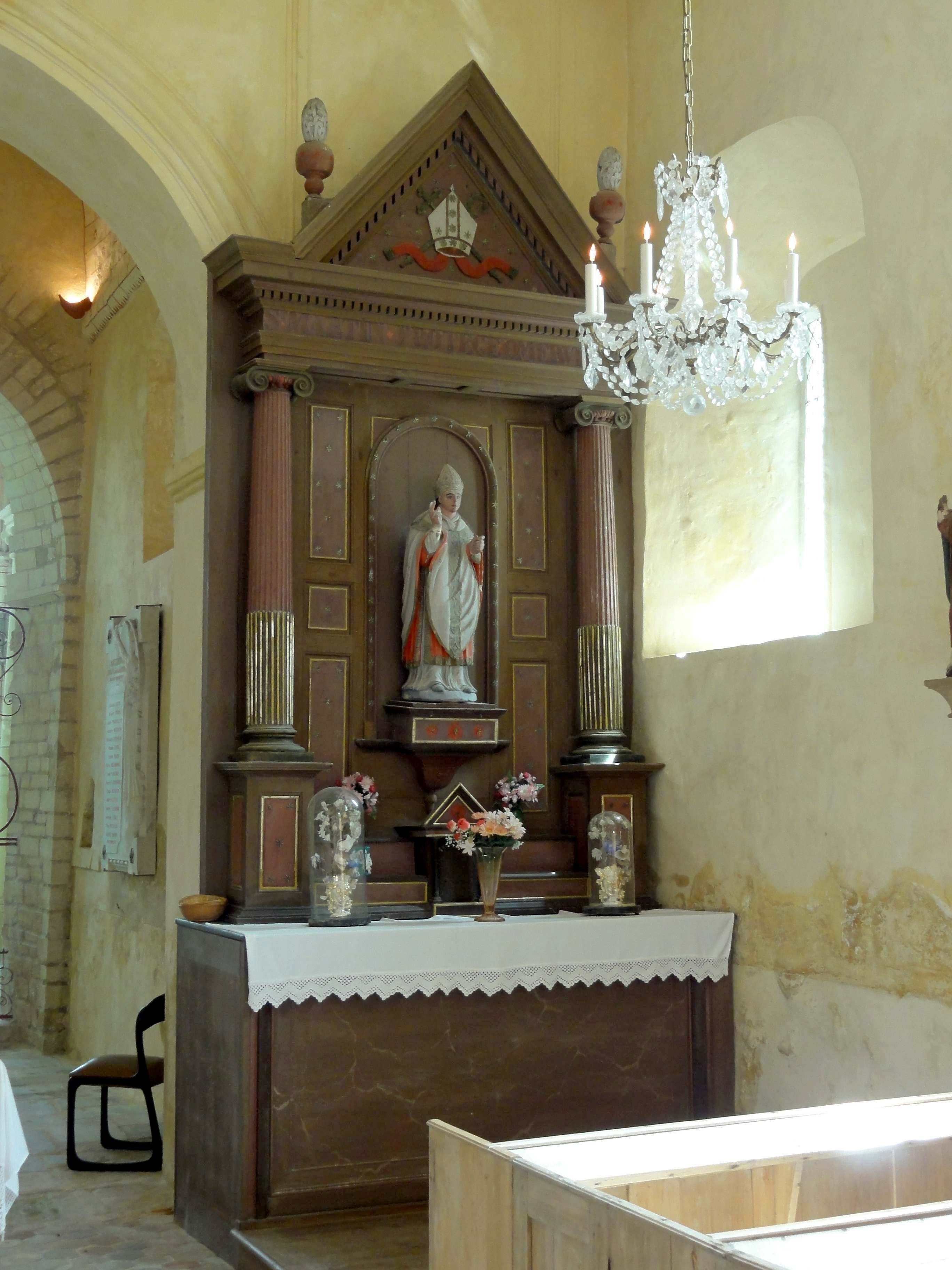 Mobilier de l'église (voir titre).